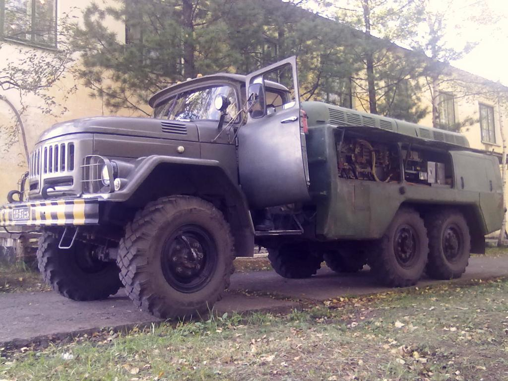 АПА-50